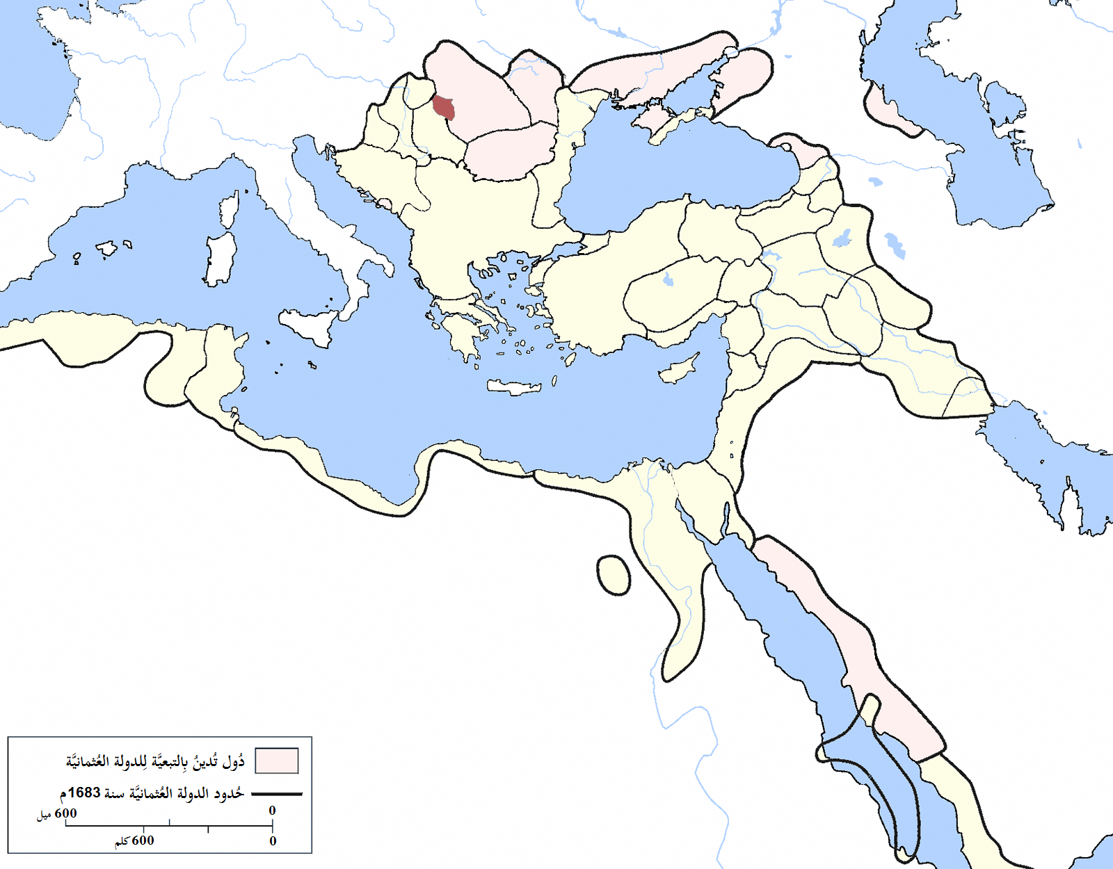 خريطة إيالة وارد بِالدولة العُثمانيَّة سنة 1683م